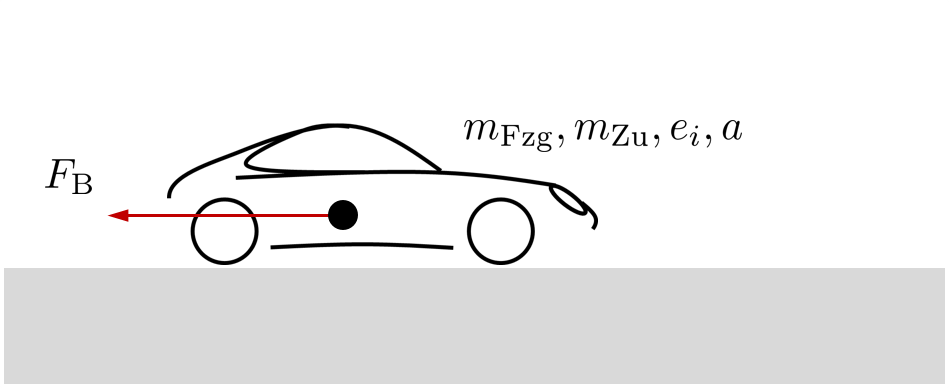 Prinzipskizze zum Beschleunigungswiderstand an Fahrzeugen